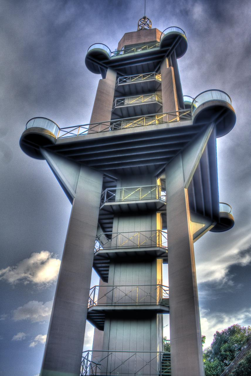 Belém/PA - Brazil